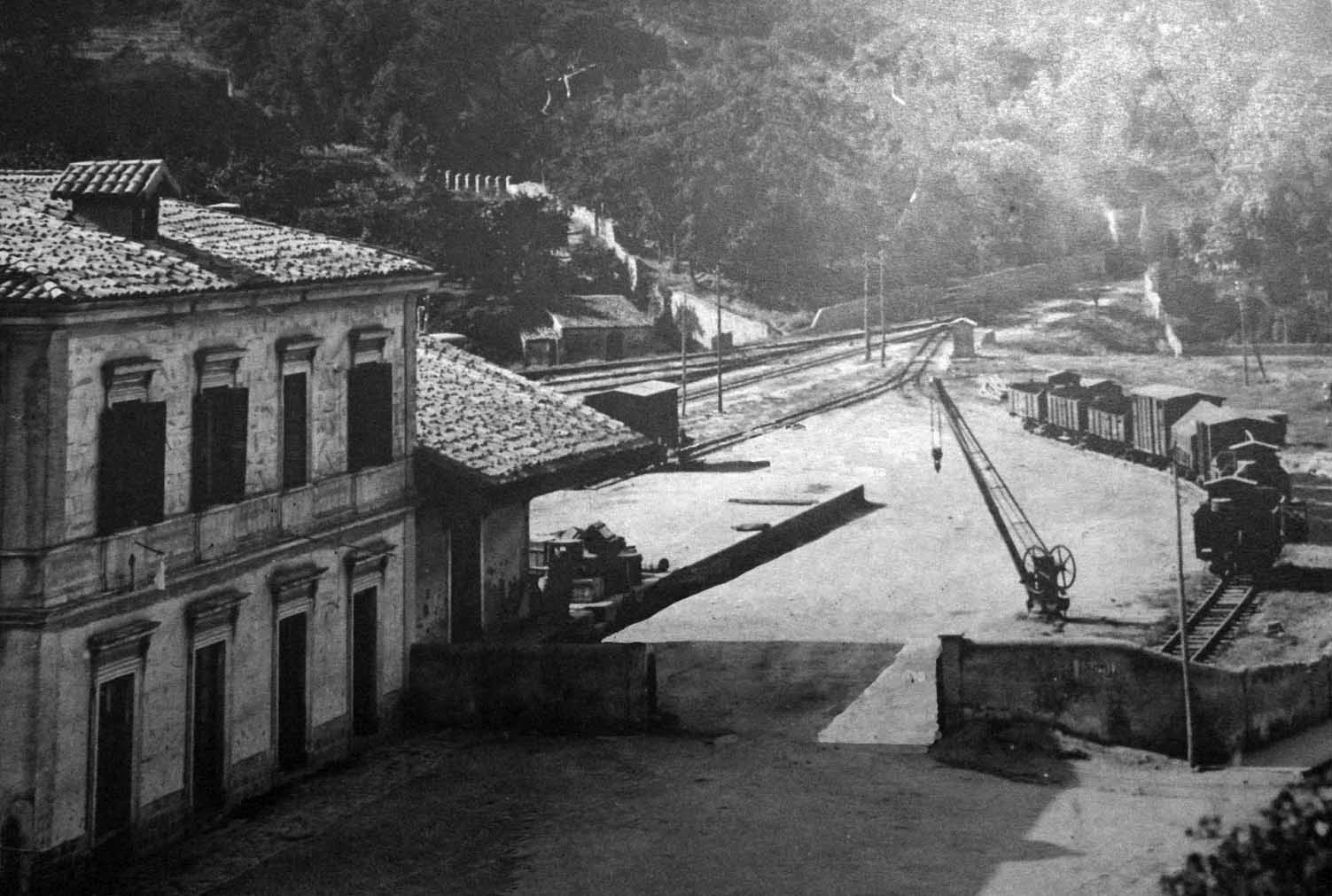 Vista della stazione di Piazza Armerina intorno al 1925, lato esterno e scalo merci